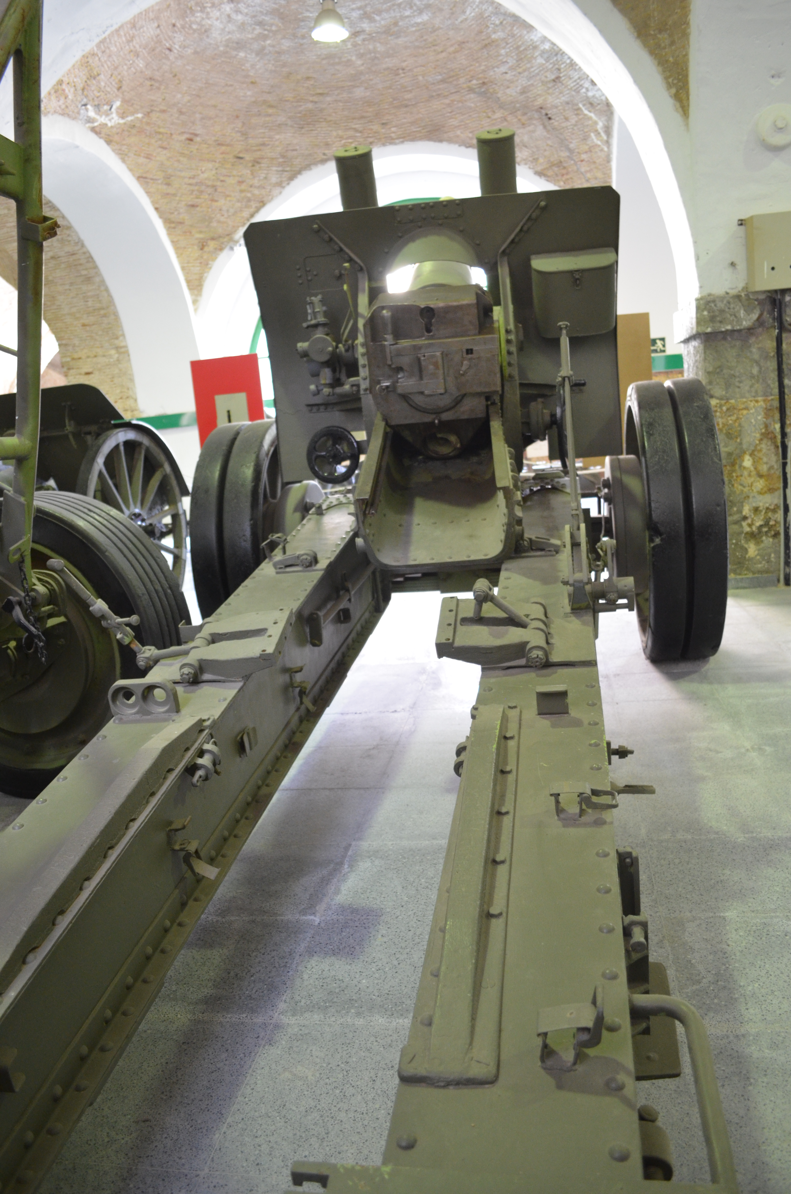 Cañón 122/46 de procedencia soviética